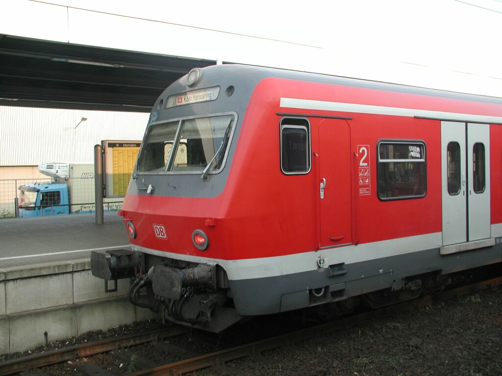 BxF-Steuerwagen in Köln-Mülheim